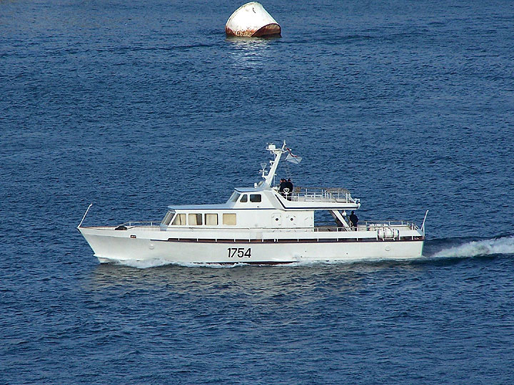 Катер связи "КСВ-1754". Проект 14670. Черноморский флот Российской Федерации. Савастополь.